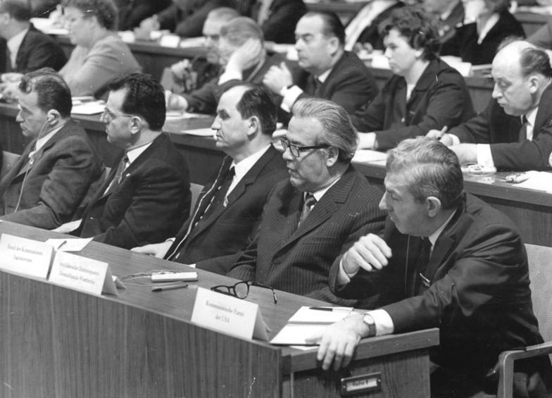 Zentralbild Junge 18.4.1967 Th VII. Parteitag der SED - 17.4.1967. Teilansicht des Präsidiums in der Werner-Seelenbinder-Halle - von rechts: Hyman Lumer, Mitglied des Nationalen Exekutivbüros der KP der USA, Gerhard Danelius, Vorsitzender der SED-Westberlin, Djoko Pajkovic, Mitglied des Präsidiums des ZK der BDKJ, Dr. Werner Jarowinsky, Kandidat des Politbüros des ZK der SED und Pietro Ingrao, Mitglied des Politbüros des ZK der KBI.